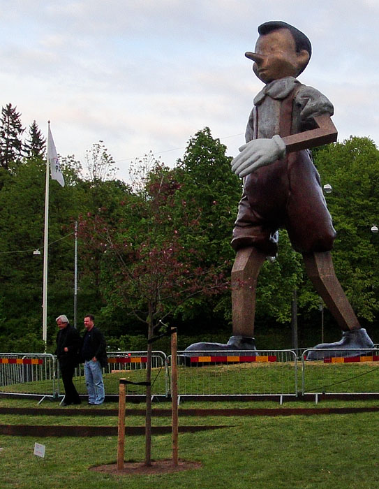 Jim Dines Pinocchio-skulptur Walking to Borås.